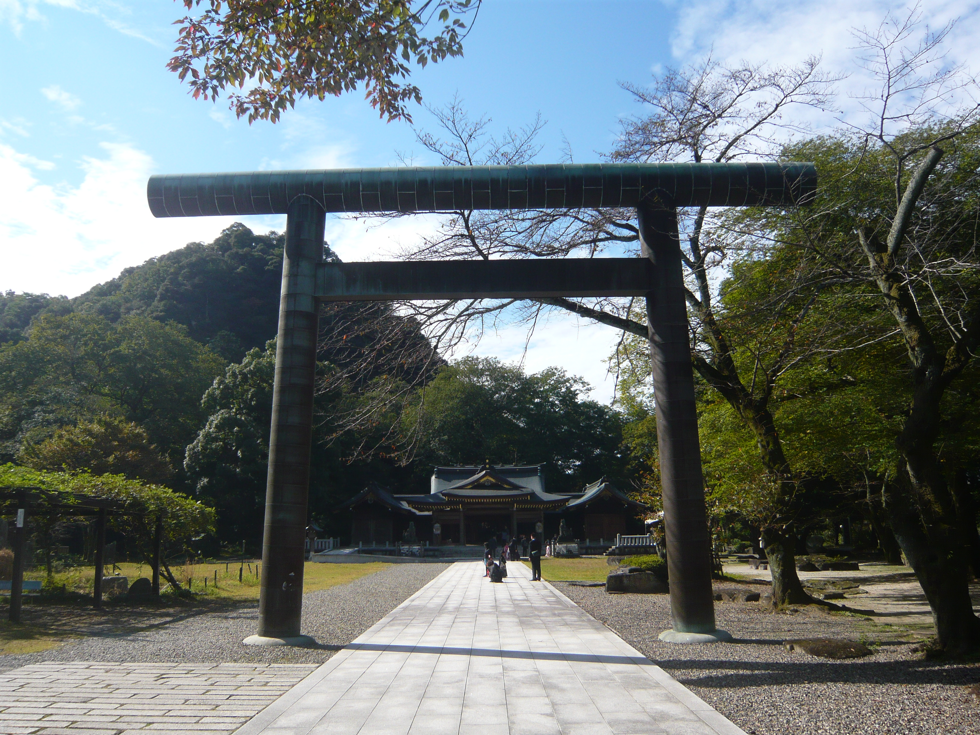 Gifugokoku Jinja（岐阜護國神社）,Gifu,Gifu,Japan（岐阜県岐阜市）で撮影。